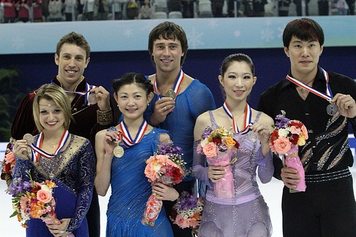 Подиум в парном катании на Кубке Китая 2011. Слева на право: Кирстен Мур-Тауэрс / Дилан Москович (3 место), Юко Кавагути / Александр Смирнов (1-е место), Чжан Дань / Чжан Хао (2-е место)